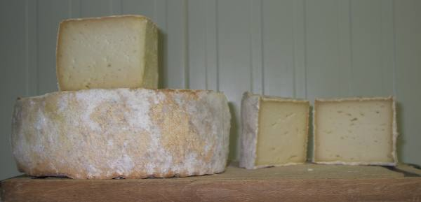 à gauche : Le Lévéjac (pâte pressée mécaniquement) à droite : Le Lévéjac (pâte molle)